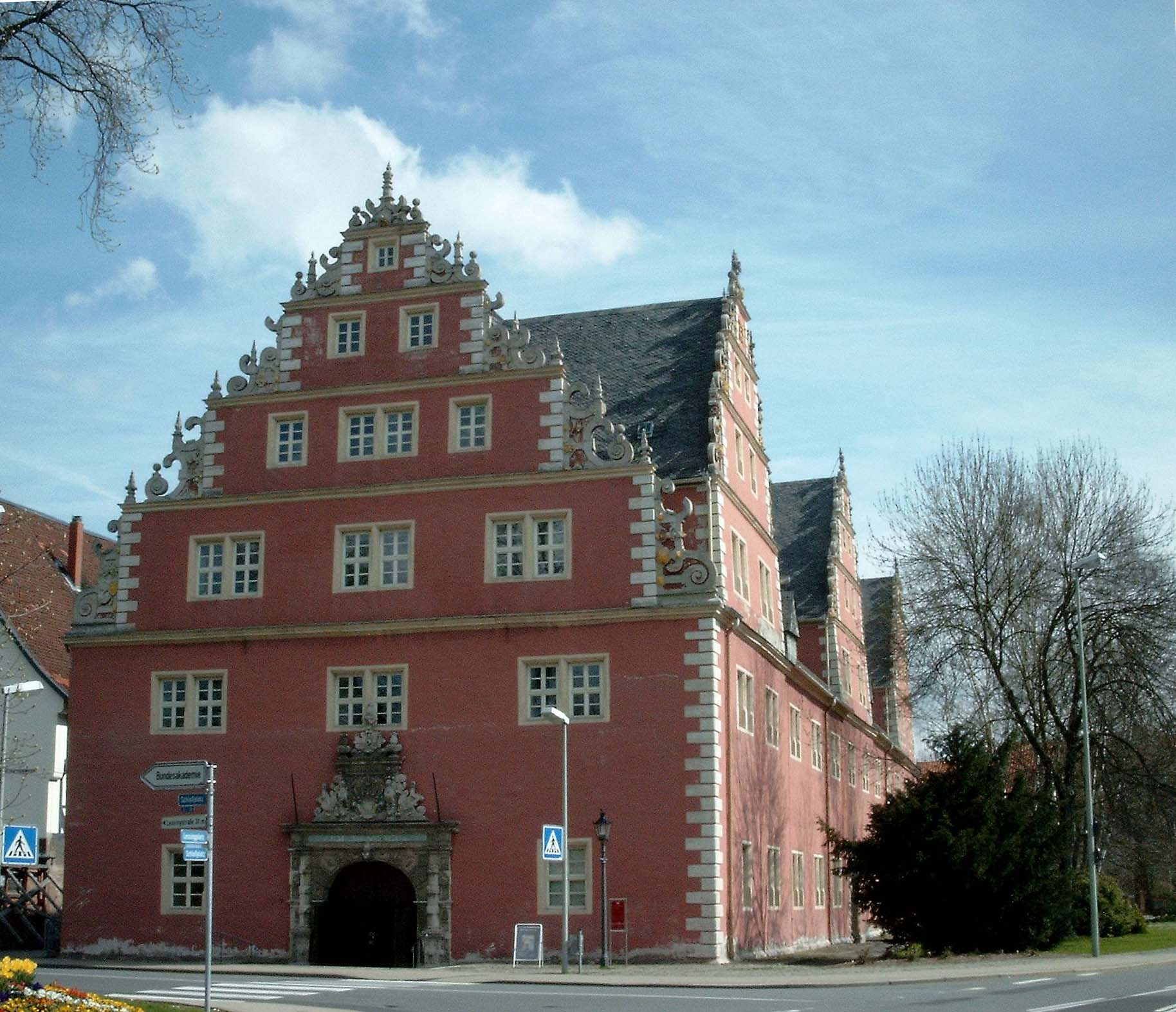 Zeughaus in Wolfenbüttel, ein Gebäude des Bibliothekquartiers der Herzog August Bibliothek Wolfenbüttel (HAB), von Westen gesehen. Das Gebäude wird für einen Teil der HAB genutzt.